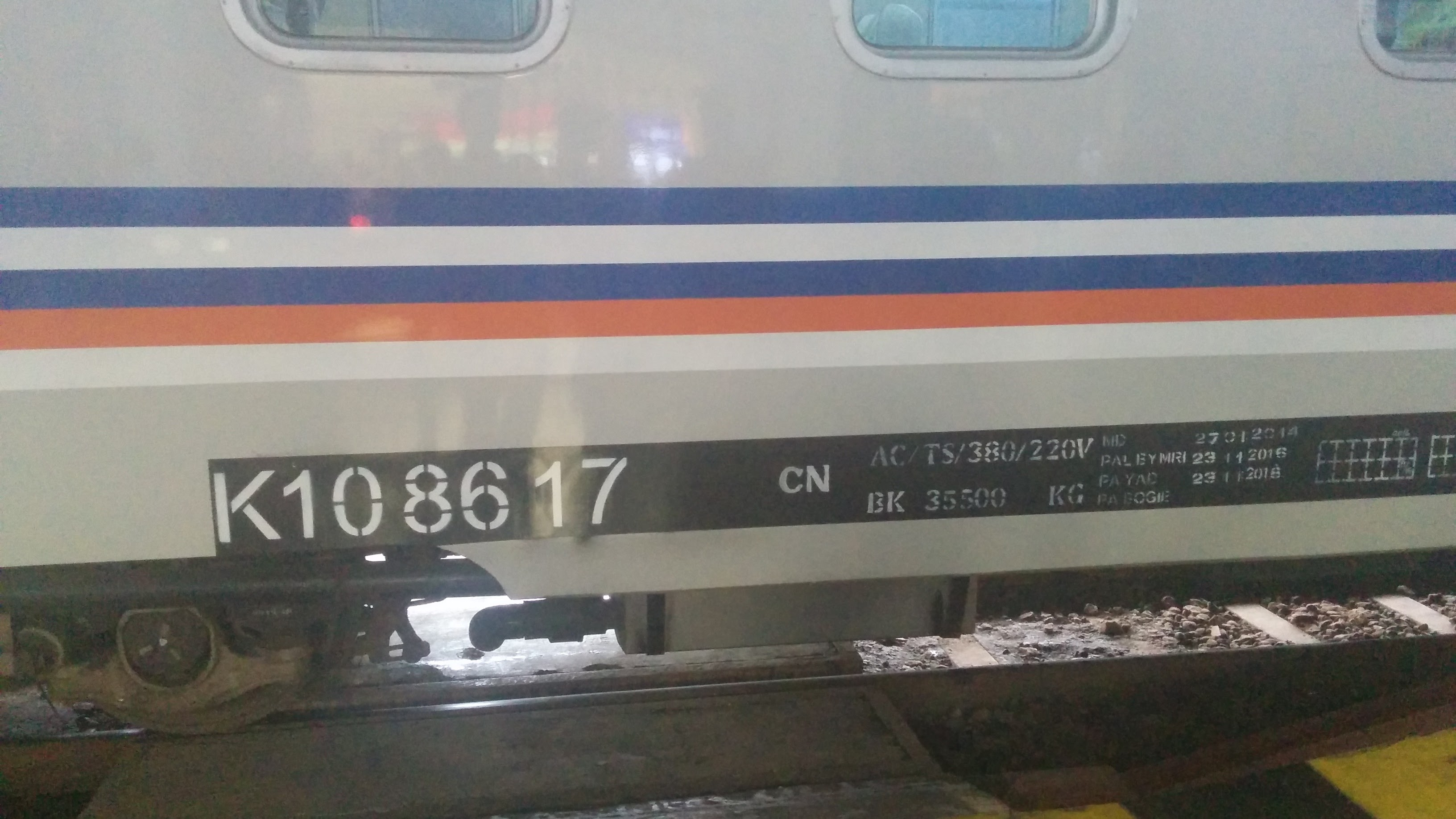 Contoh Penomoran Kereta Eksekutif di Indonesia, dalam hal ini K1 0 86 17 CN. Perhatikan kereta ini adalah eks. K1 0 15 04 CN.